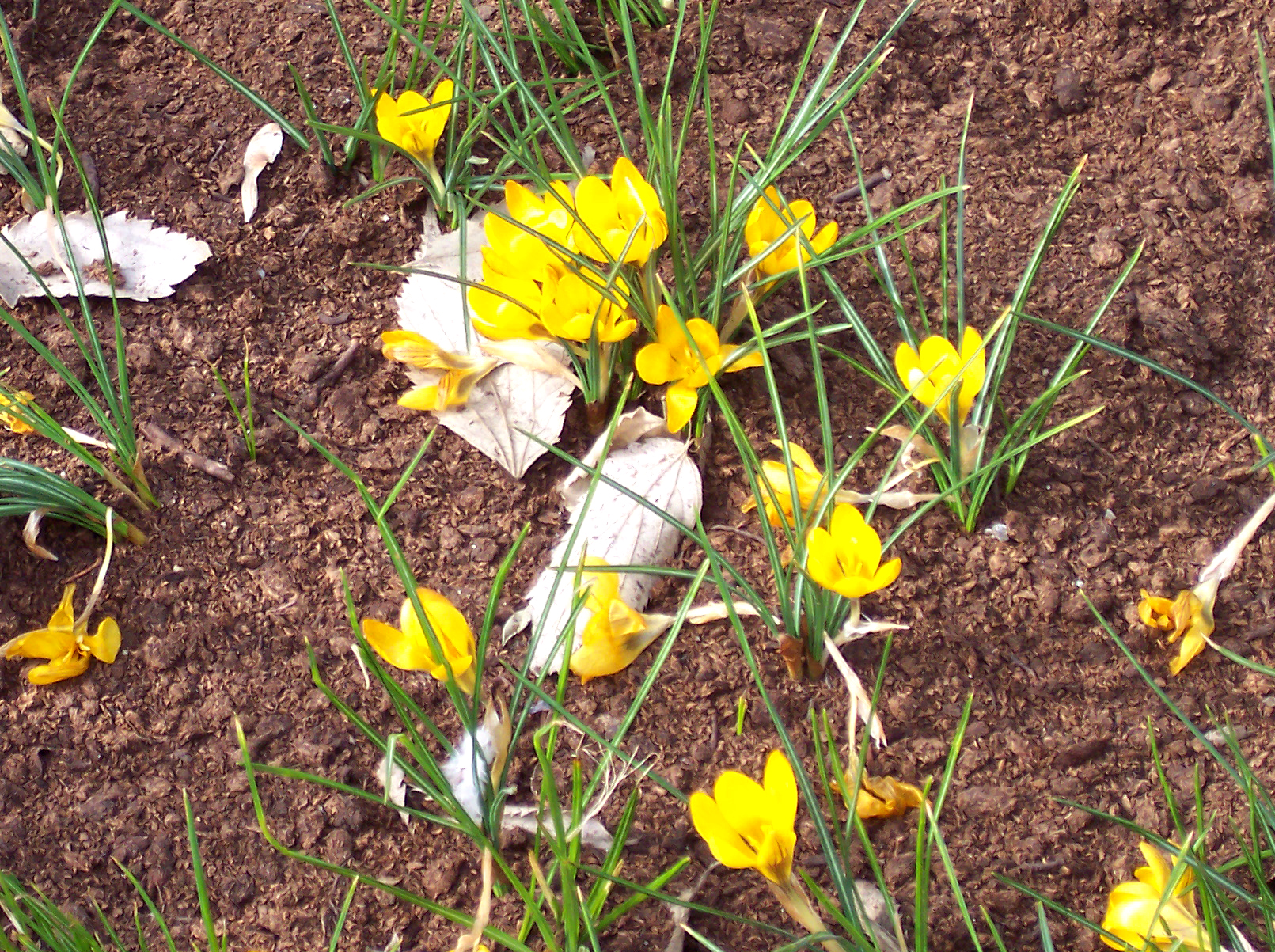 Crocus chrysanthus 'Zwanenburg Bronze'. Real Jardín Botánico de Madrid.